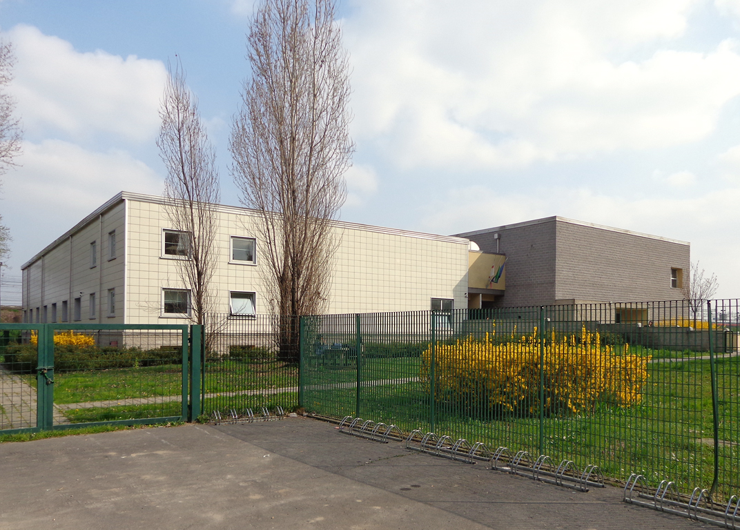 Milano, la biblioteca "Valvassori Peroni" nell'omonima via.